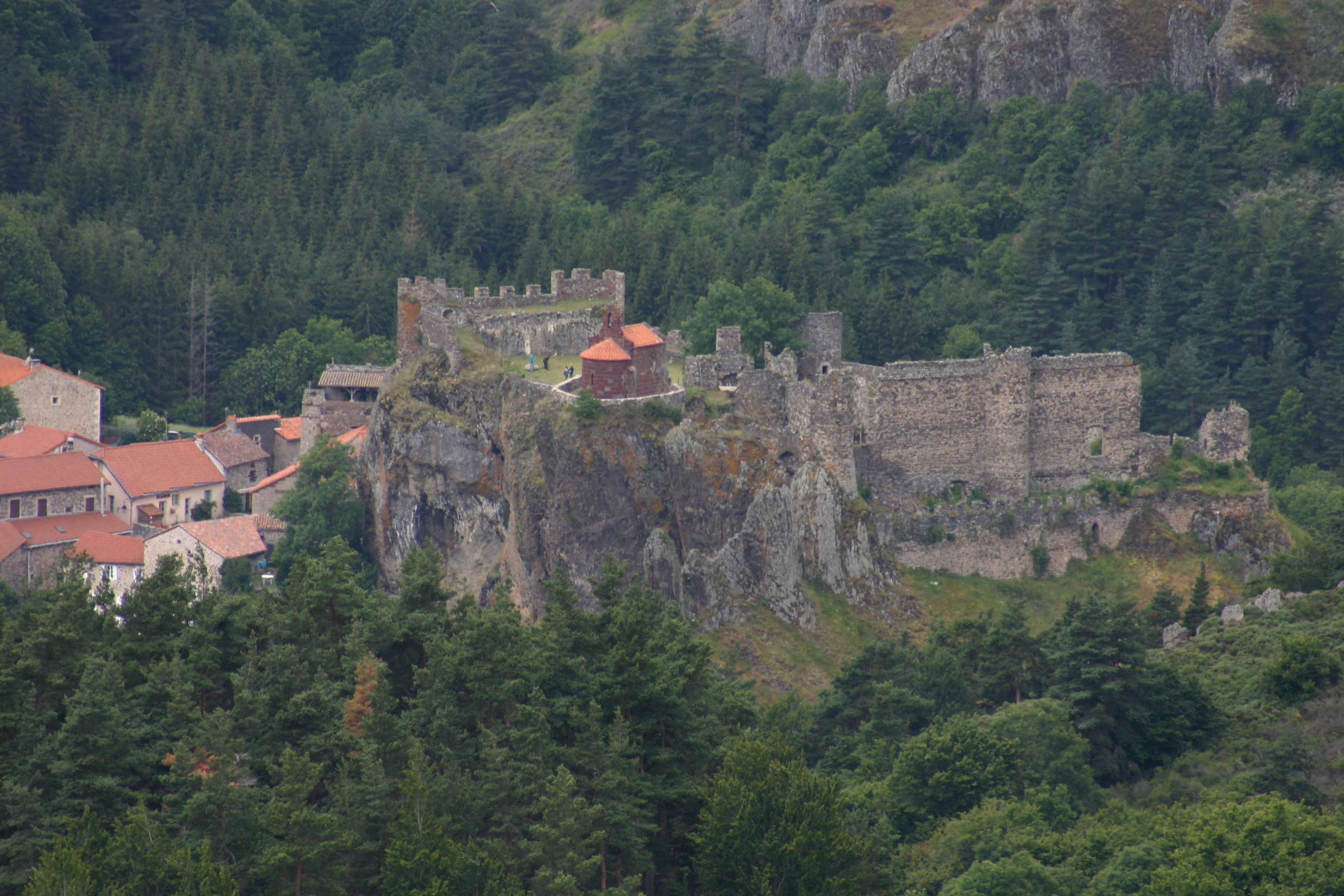 Chateau d'Arlempdes depuis le camp d'Antoune .